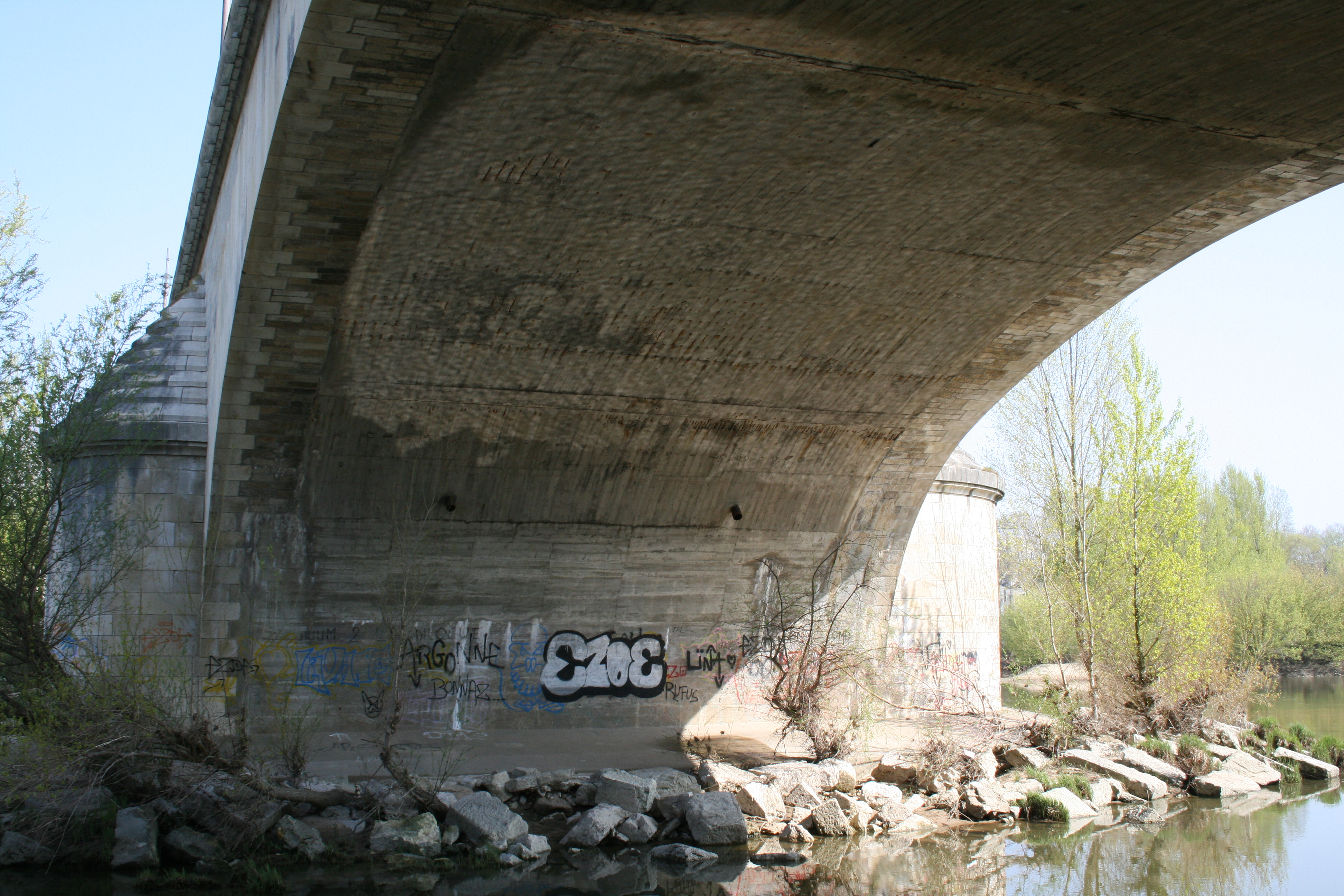 Arche 9, rive sud, pont George V, Orléans, Loiret, France